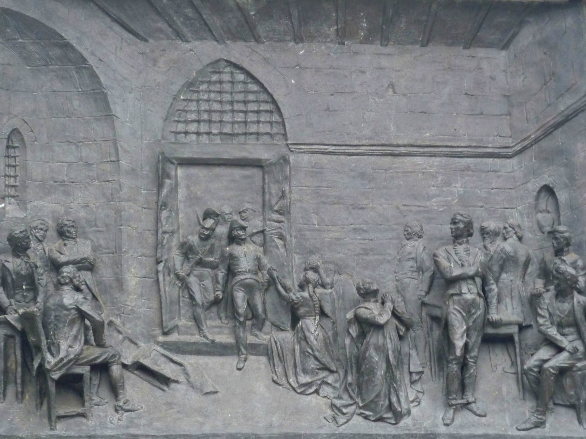 Detalle de la palaca con el relieve titulado "2 de agosto de 1810", que representa la masacre de los próceres que un año antes habían declarado la independencia de Quito del poder napoleónico en España. Ubicado en la base del Monumento de la Independencia, de la Plaza Grande de Quito DM (Ecuador).